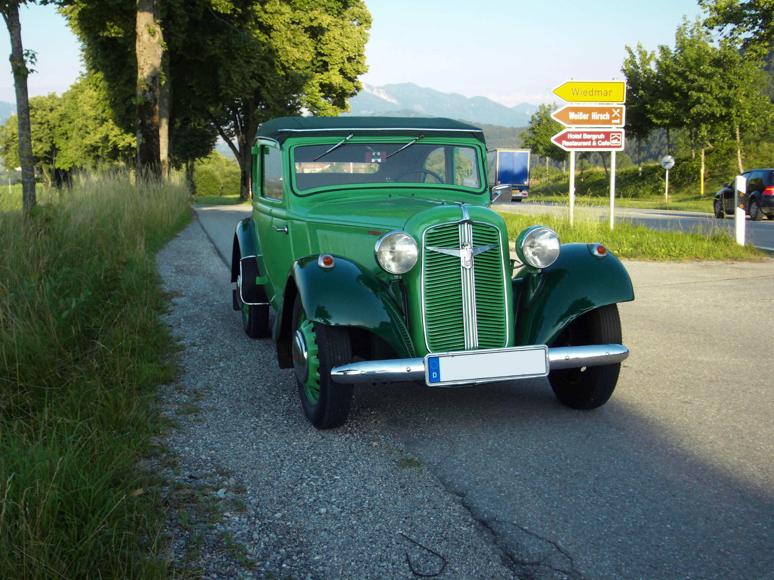 Adler Trumpf Junior bei Füssen